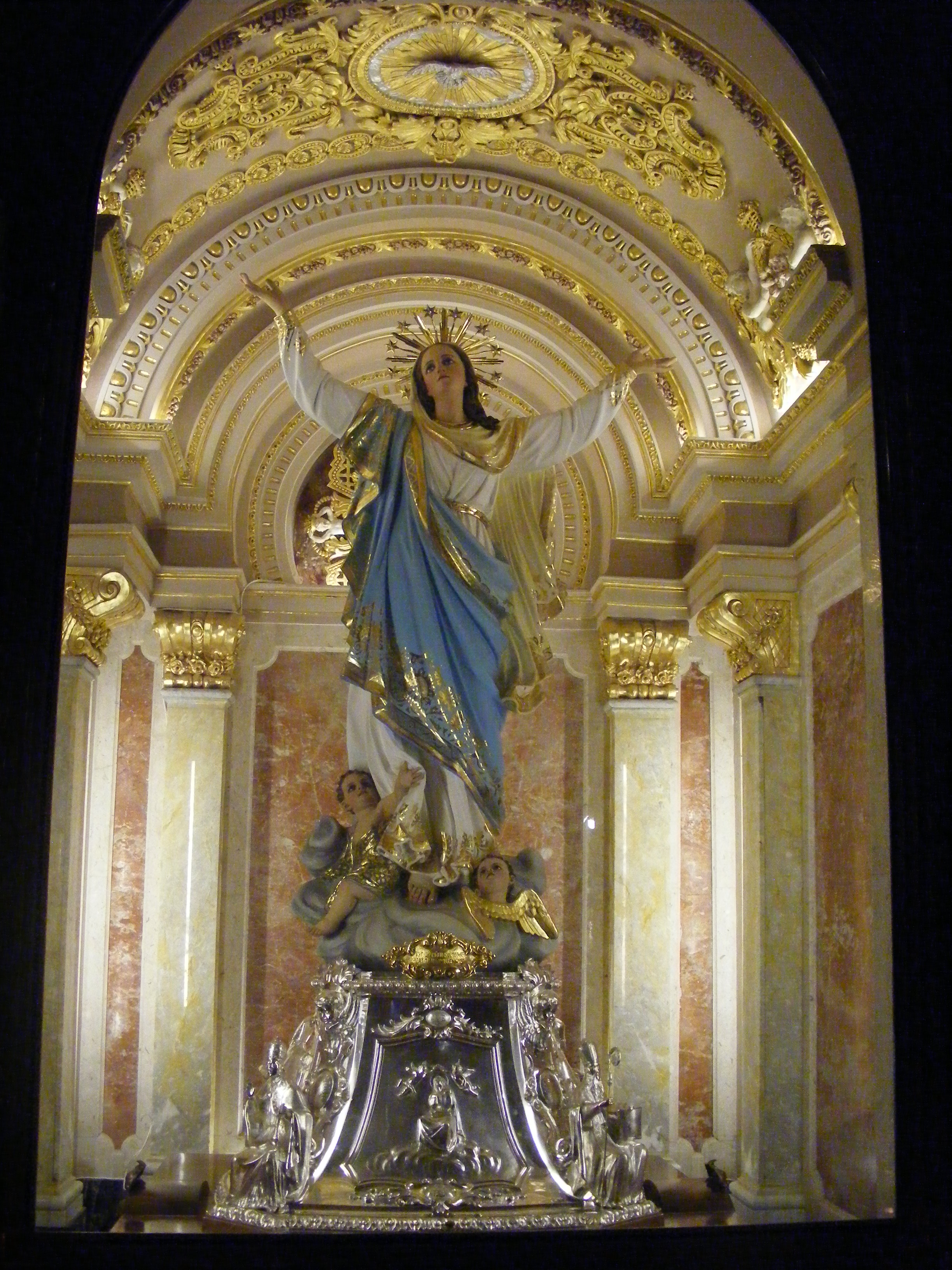 Tytularna statua procesyjna "Wniebowzięcie Matki Bożej", wykonana w rzymie w 1897, w katedrze od 1957.